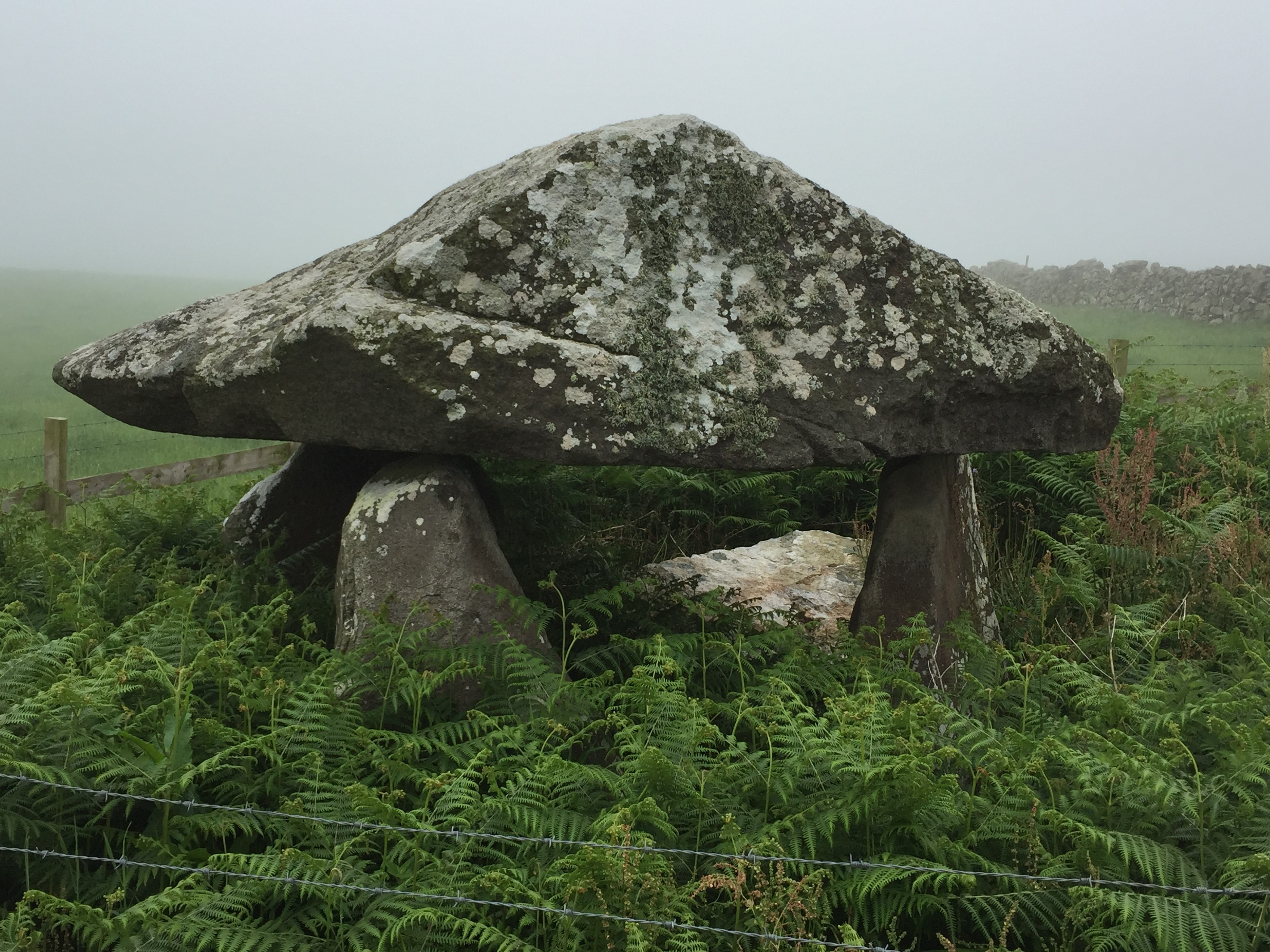 Cromlech Cefnamwlch